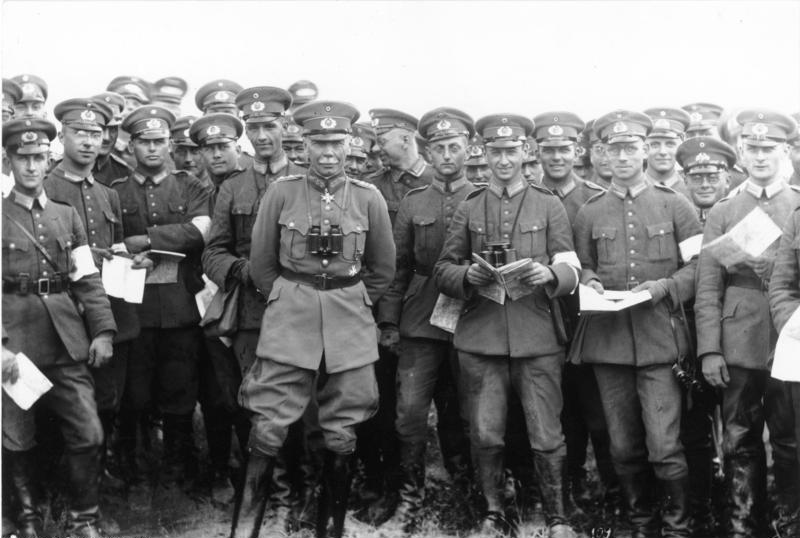 Der Schöpfer und Organisation der Reichswehr [Generaloberst Hans von Seeckt] mit seinen Infanterieschülern (Dresden) im ersten Reichswehrmanöver 1925 in Thüringen, bei Erfurt als Chef der Heeresleitung.